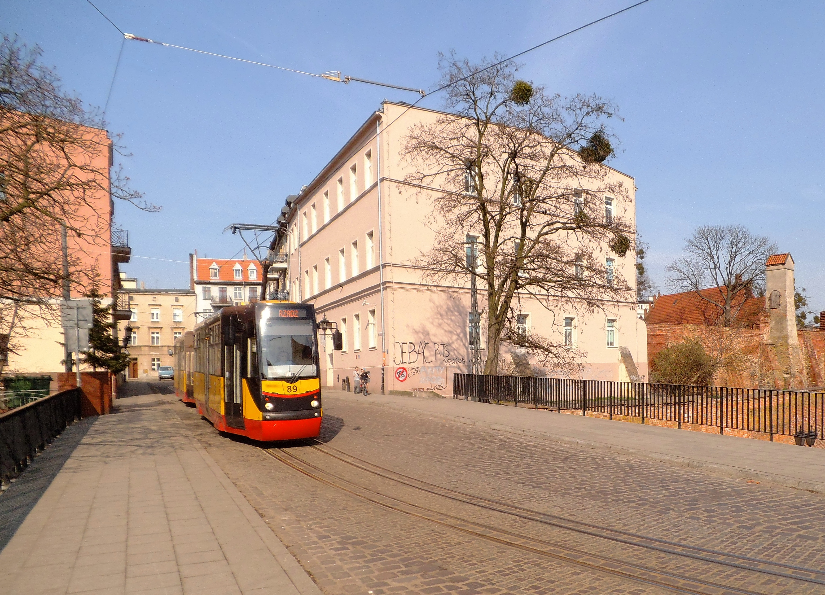 Ulica Klasztorna w Grudziądzu